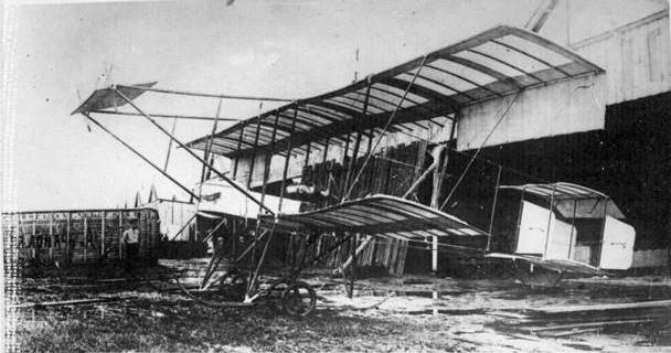 Биплан ПТА № 1, проэкт С. А. Ульянина. 1911 год.